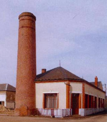 Cheminée en briques de l'usine Brinon